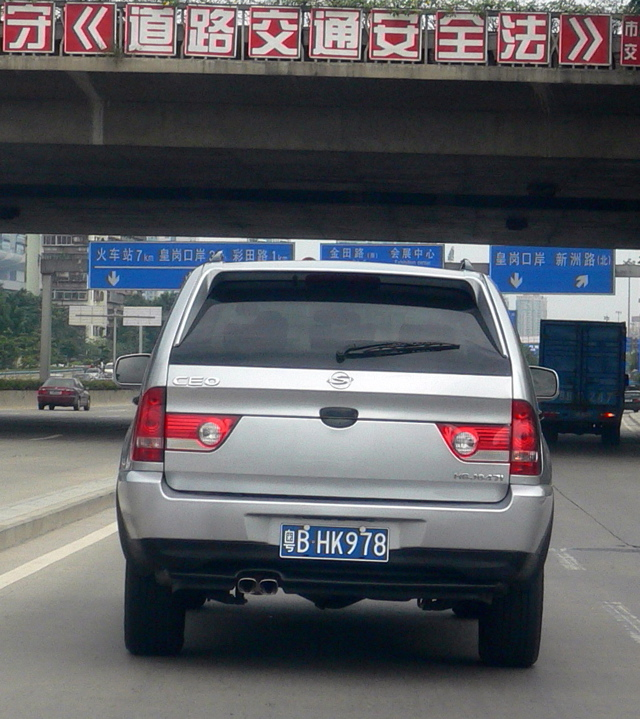 Shuanghuan CEO